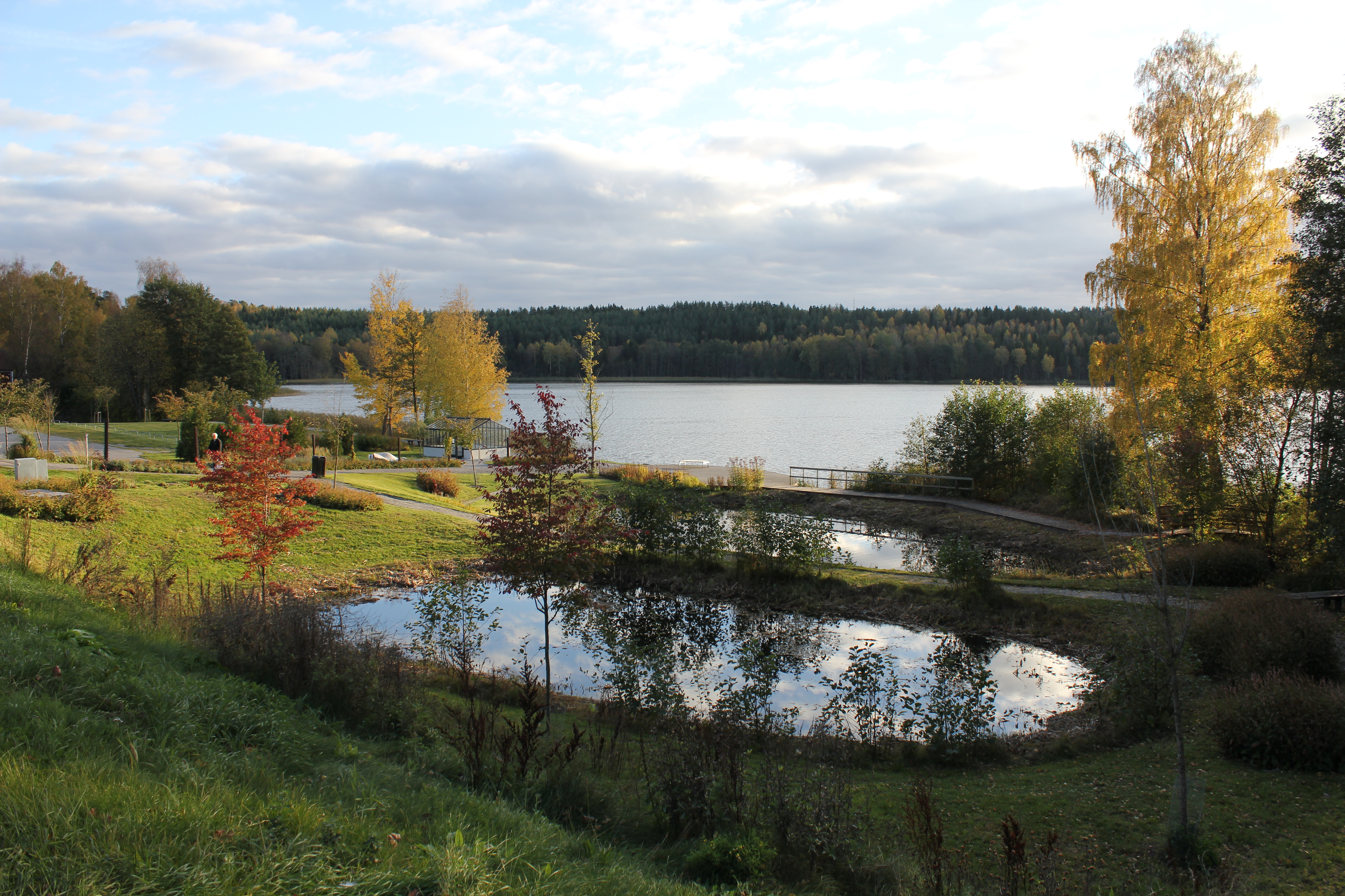 Parken vid Malmsjön i Vårsta, Botkyrka kommun.